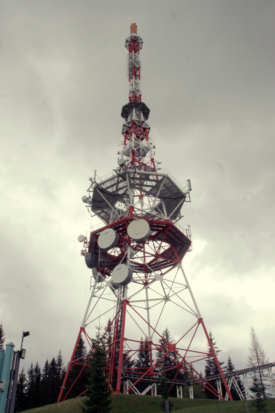 Maszt Radiowo-Telewizyjnego Ośrodka Nadawczego na Gubałówce.